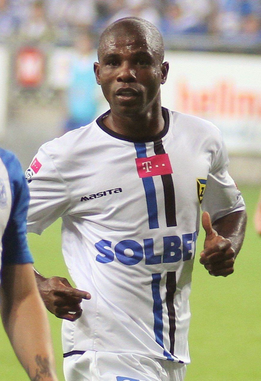 Luis Carlos podczas gry w Zawiszy Bydgoszcz